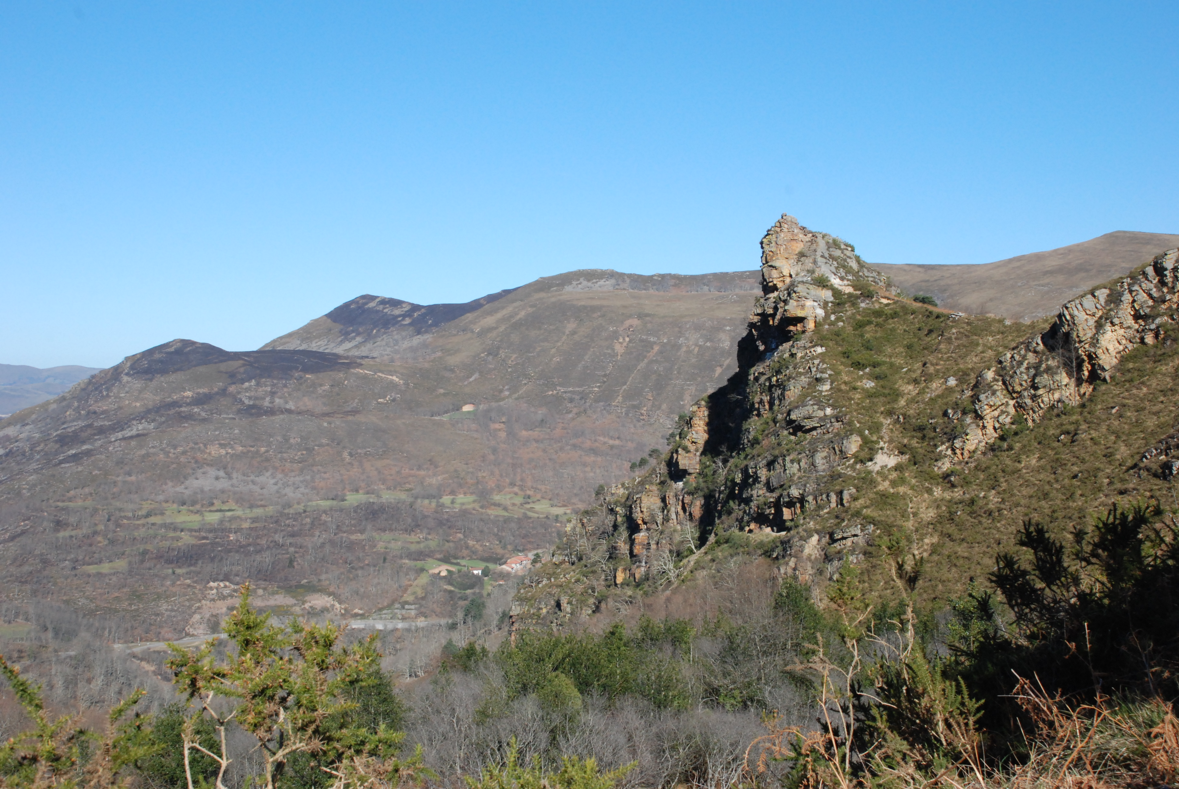 Peña Colsa, escarpado pico de 685 metros de altitud, en el cordal entre los valles del río Queriendo y el río Saja, en Cabuérniga. Al fondo, la Sierra de Bárcena Mayor